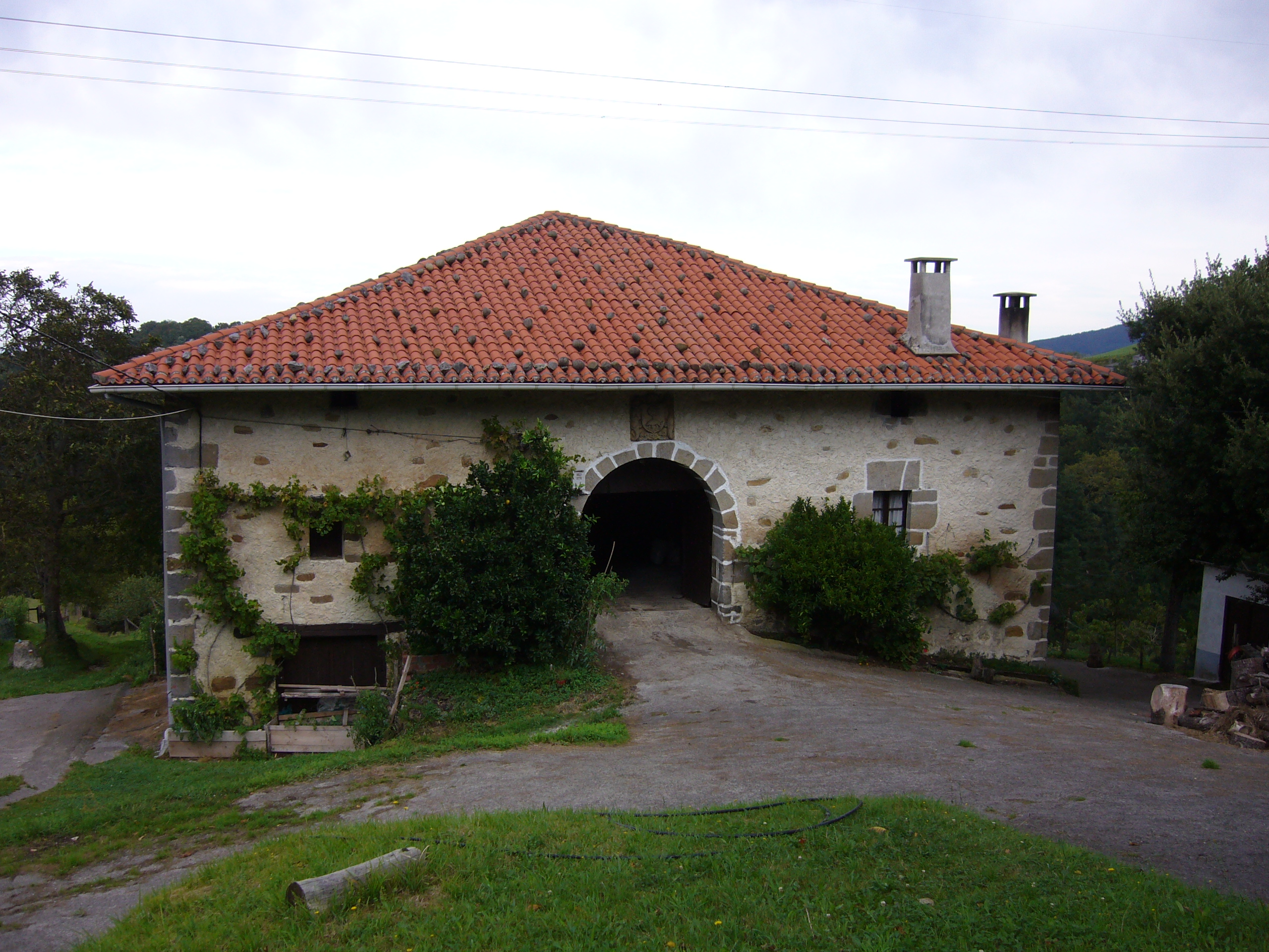 Gorostiola baserria, ondare izendatuta.